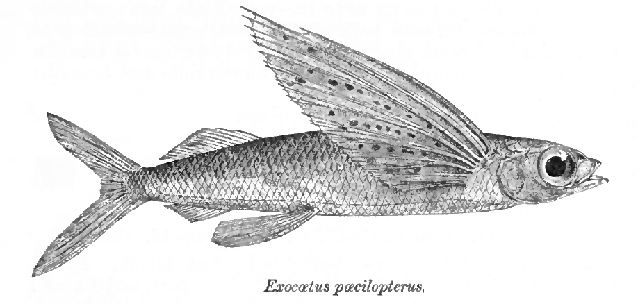 Exocœtus pœcilopterus = Cypselurus poecilopterus (Valenciennes, 1847)